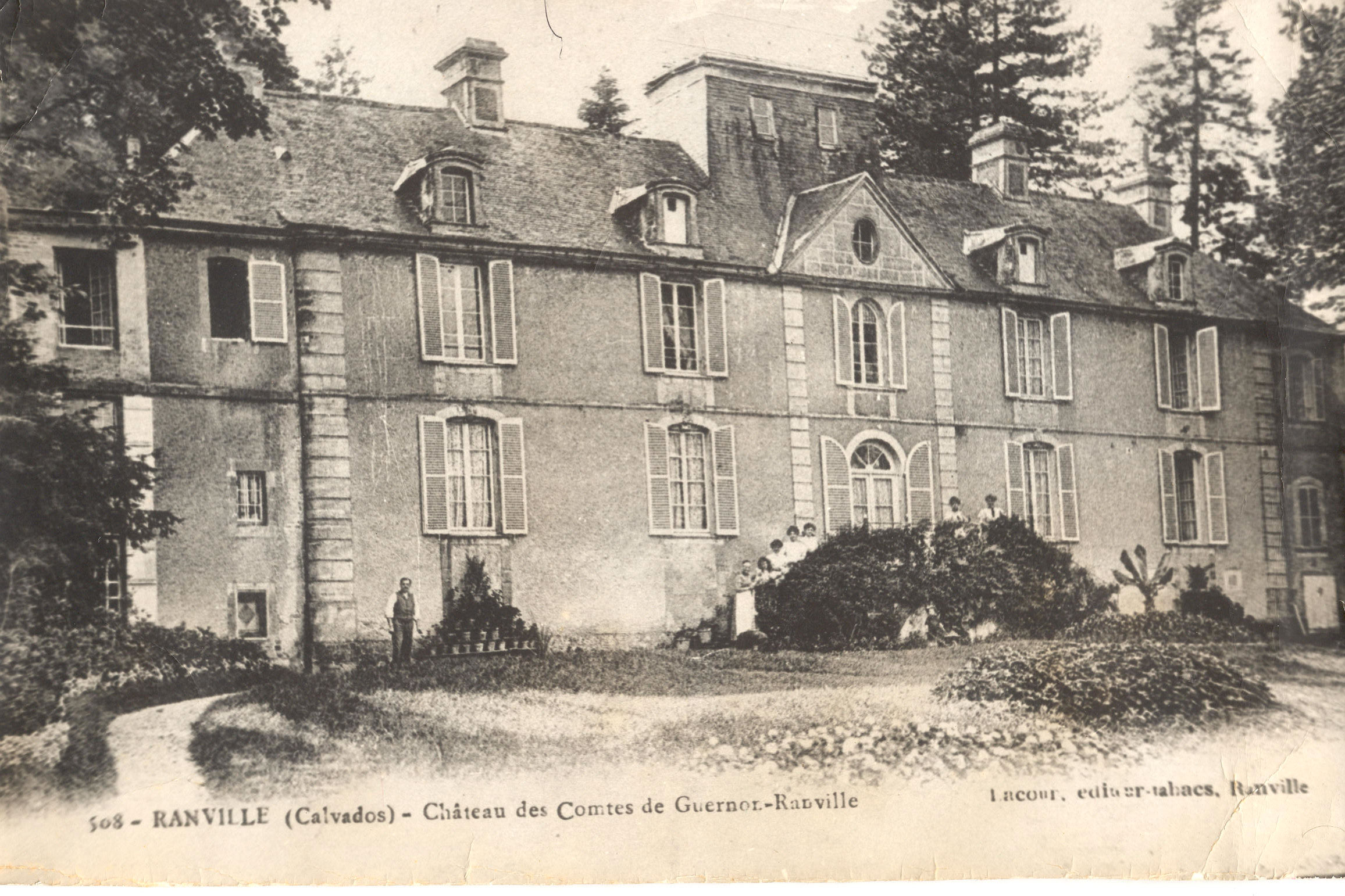 Carte postale du château de Guernon-Ranville